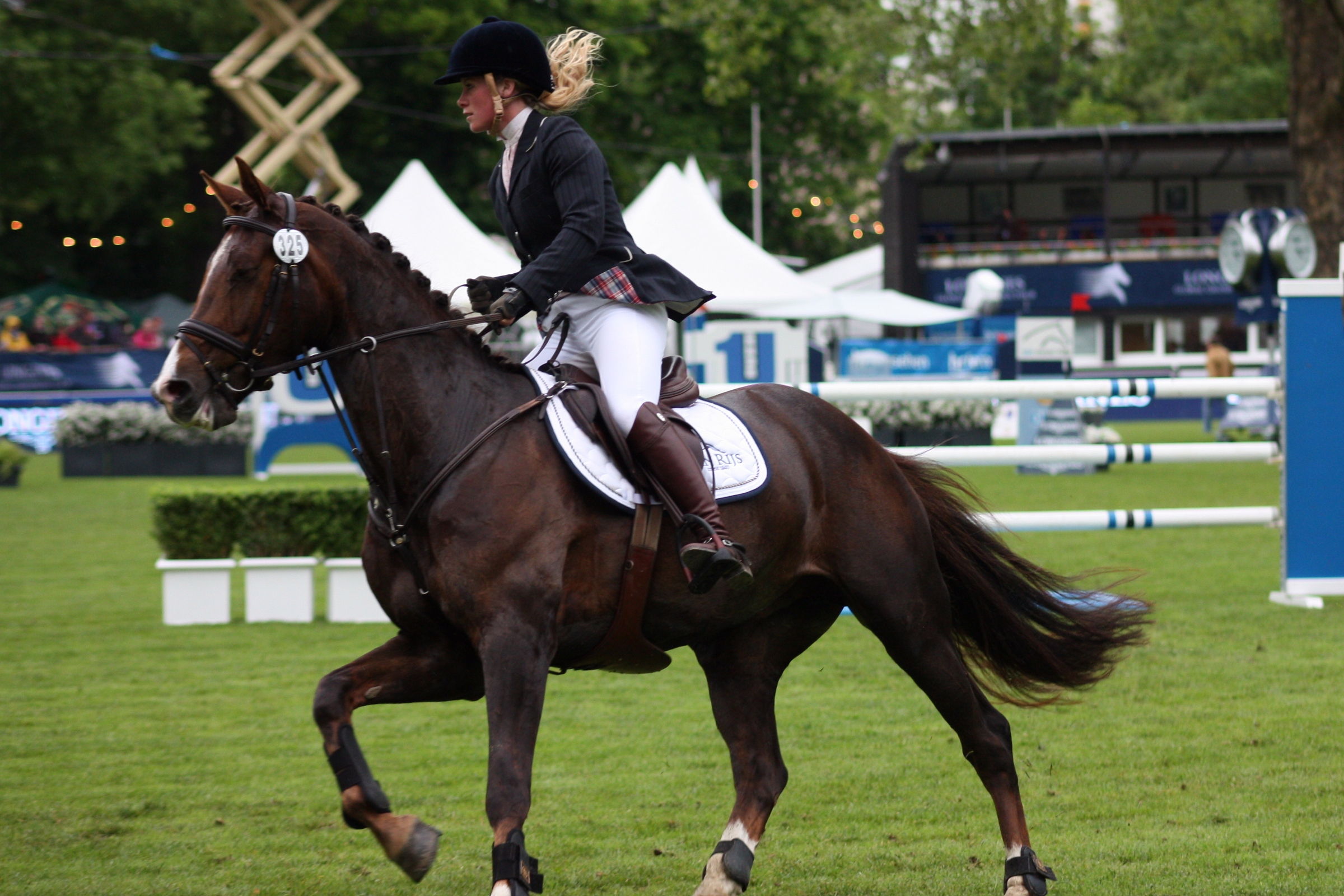 77. Internationanles Wiesbadener Pfingstunier 2013, CIC *** Vielseitigkeitsprüfung Springen, Elaine Pen auf Vira Personality rights warning Although this work is freely licensed or in the public domain, the person(s) shown may have rights that legally restrict certain re-uses unless those depicted consent to such uses. In these cases, a model release or other evidence of consent could protect you from infringement claims.